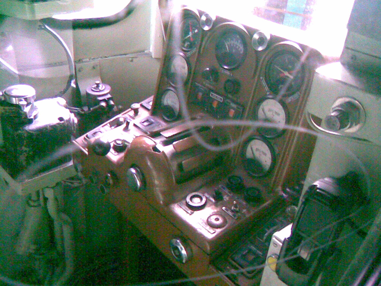 Postazione del Macchinista, in una ALn668